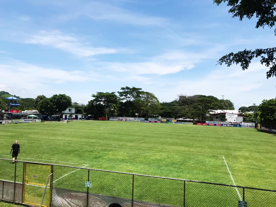 Estadio de Jicaral